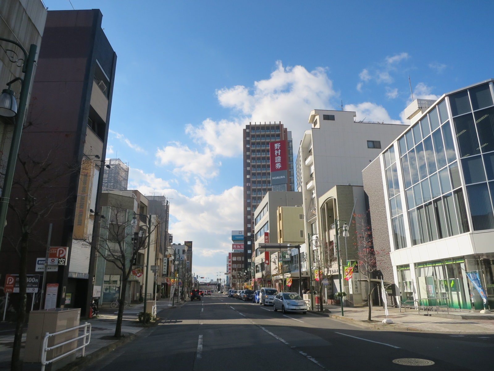 西康生通り（岡崎市）